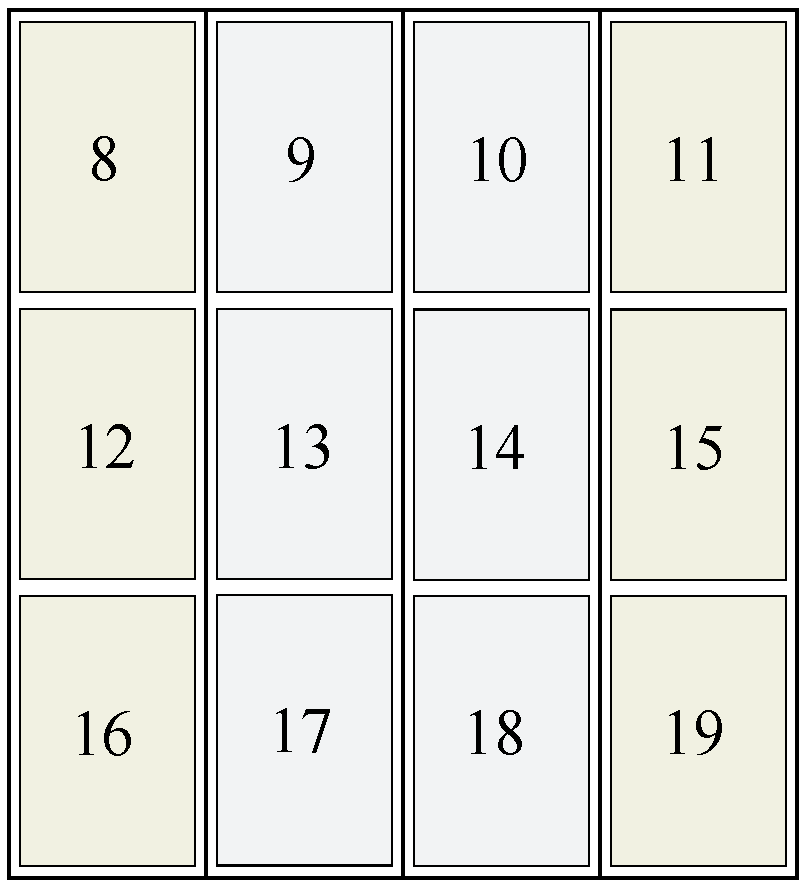 Poliptyk augustiański (rekonstrukcja) oltarz zamkniety